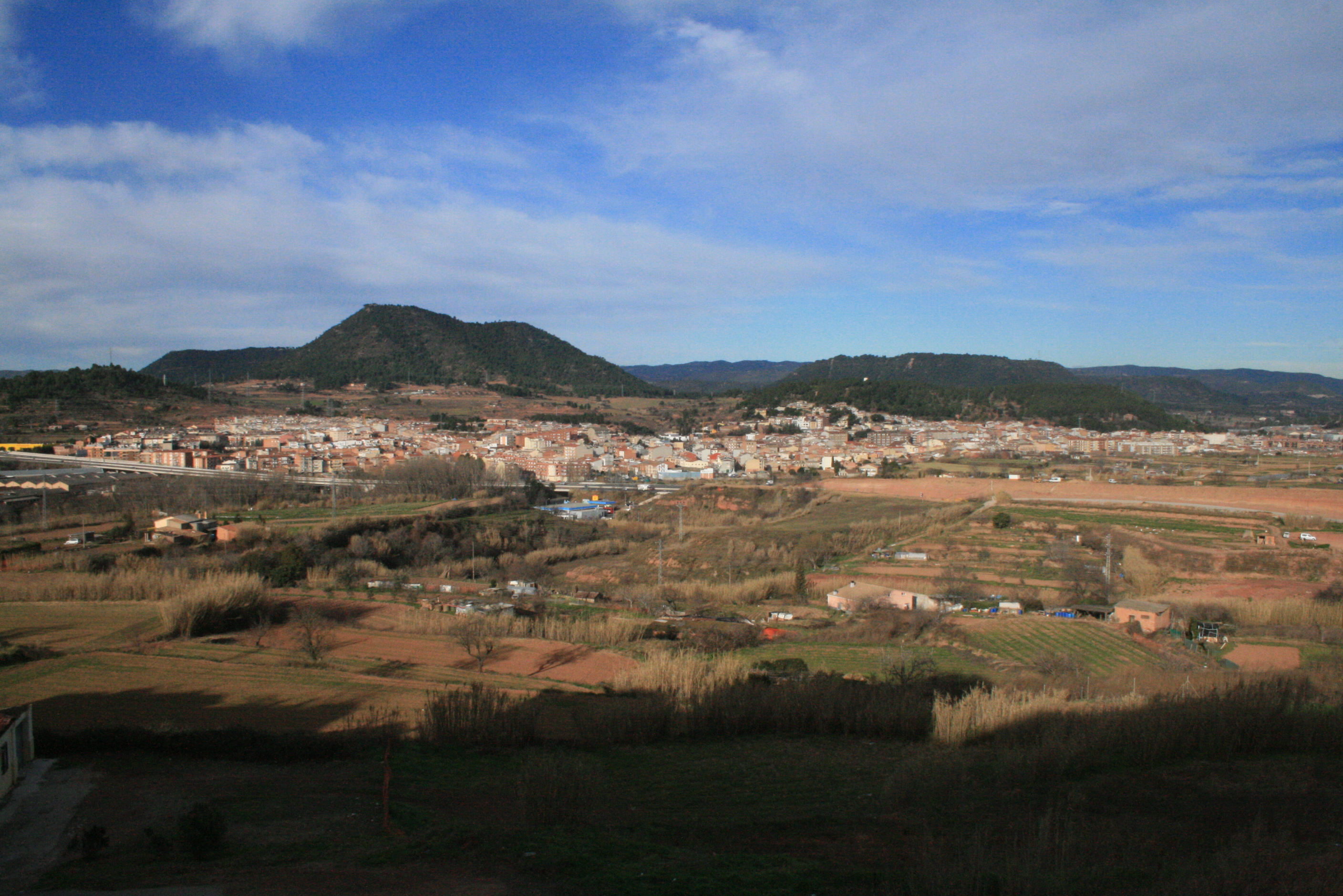 Sant Joan de Vilatorrada